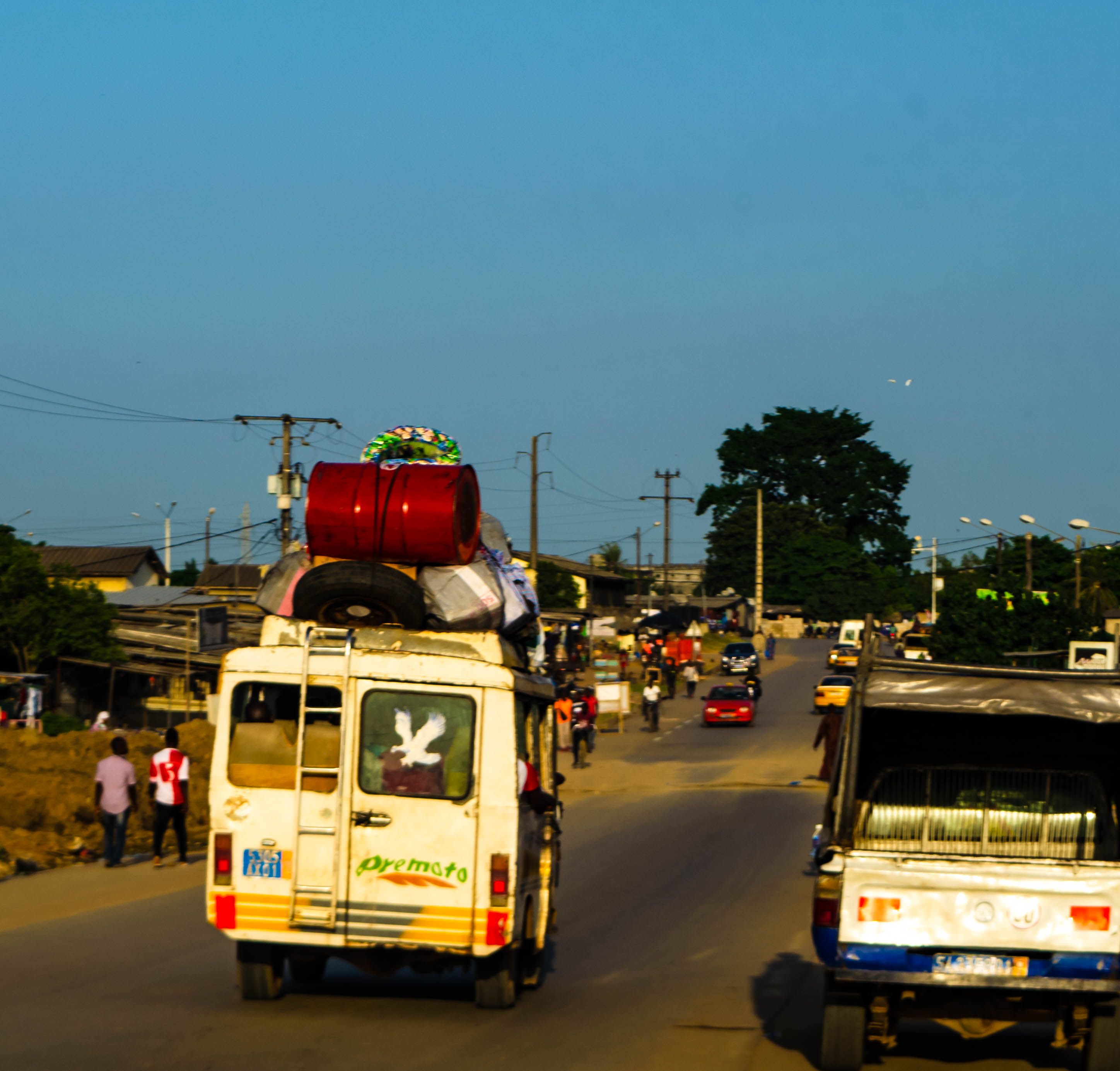 Véhicule de transport de biens et de personnes "Gbaka" reliant la ville d'Alépé à Abidjan, en Côte d'Ivoire This is an image with the theme "Africa on the Move or Transport" from: Ivory Coast